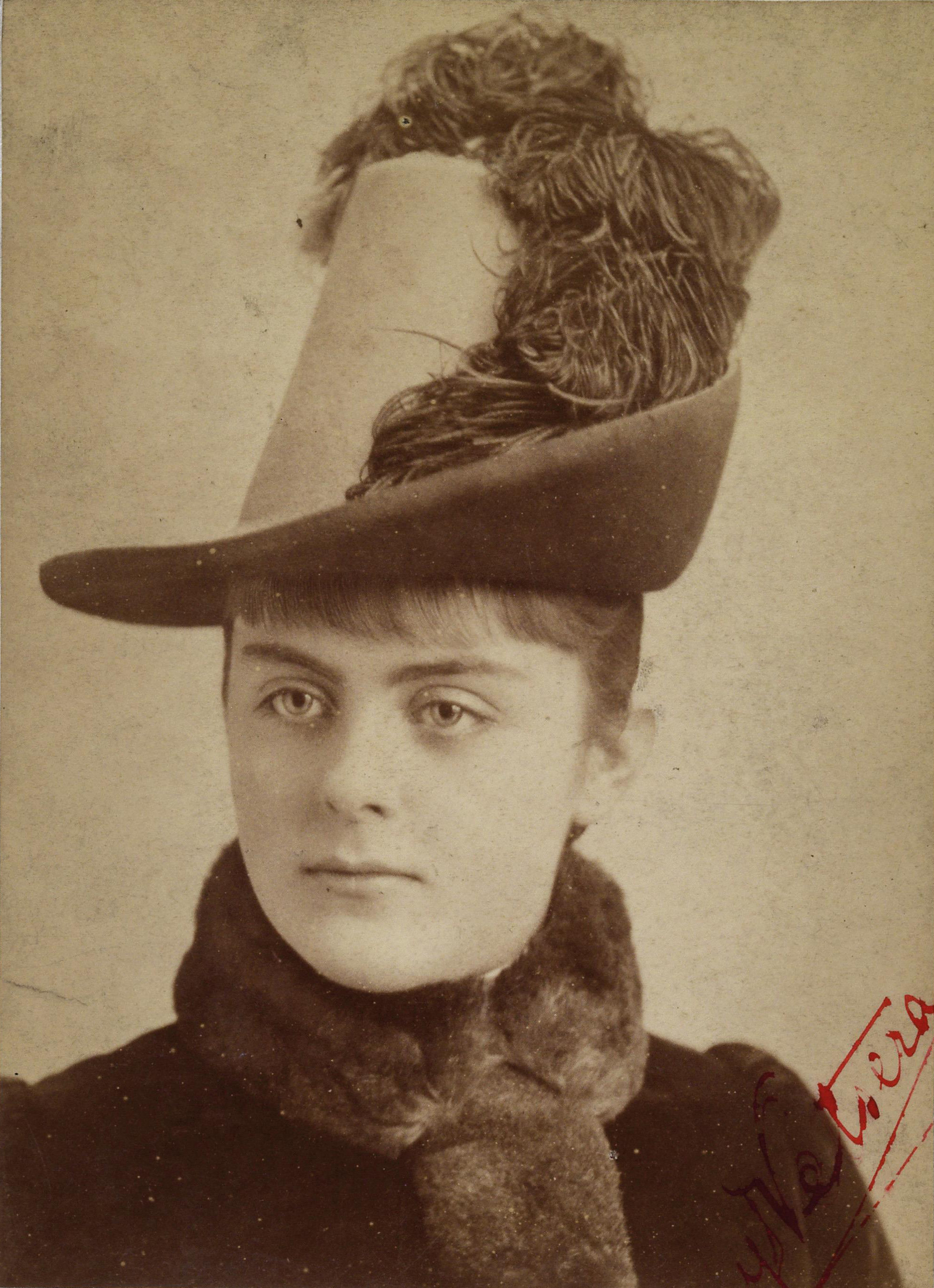 Marie Baroness Vetsera (1871-1889), Porträtphoto mit eigenhändiger Unterschrift "Mary Vetsera (18)87", Hofphotograf O. Türk, 16,5 x 11,3 cm. Ausschnitt ohne den Rahmen der Karte, nur das Foto mit einem Teil des Autogramms